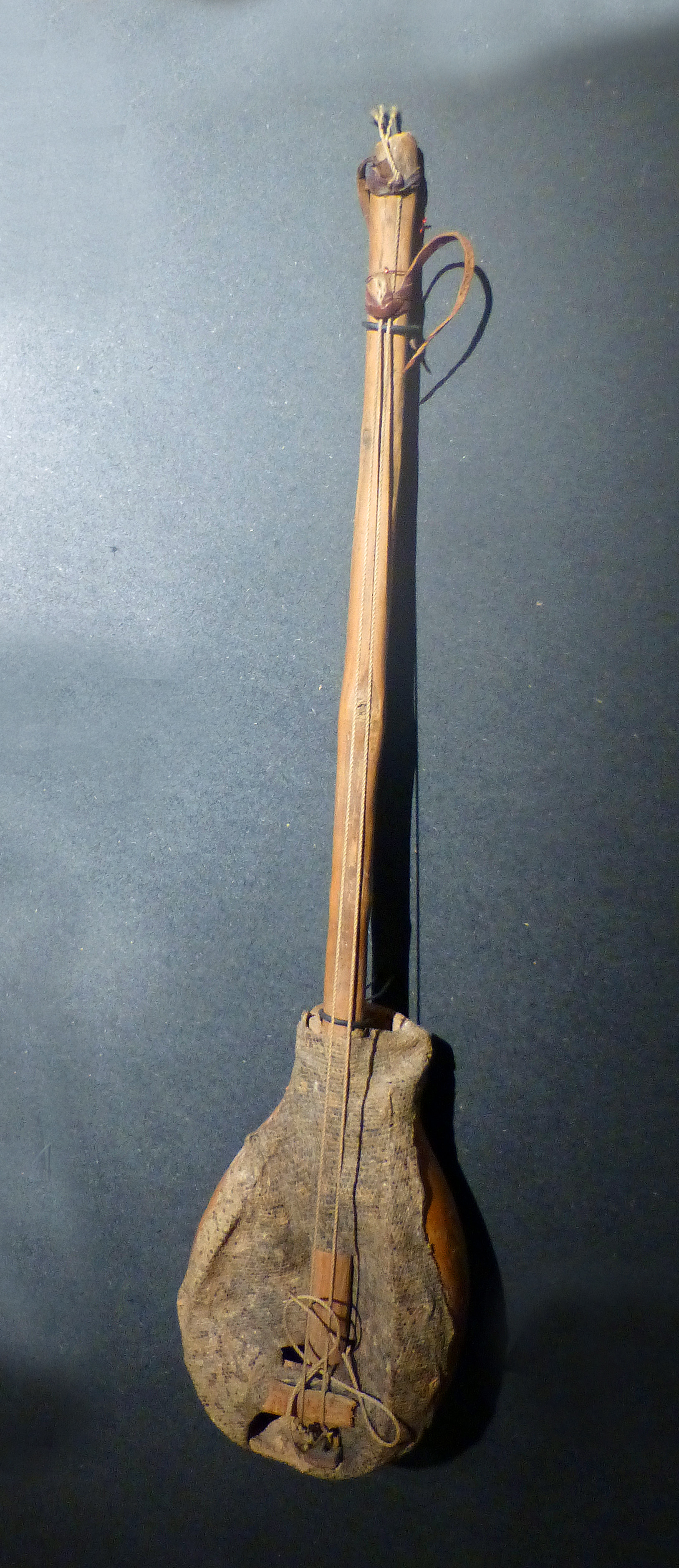 Guitare à deux cordes. Calebasse, cordes, bois. Choa, Sou, Cercle d'Afadé (Logone-et-Chari, Nord-Cameroun). Musée d'histoire naturelle et d'ethnographie de Colmar. Don : Jean Rapp, 2004 - N° d'inventaire : 2004-2